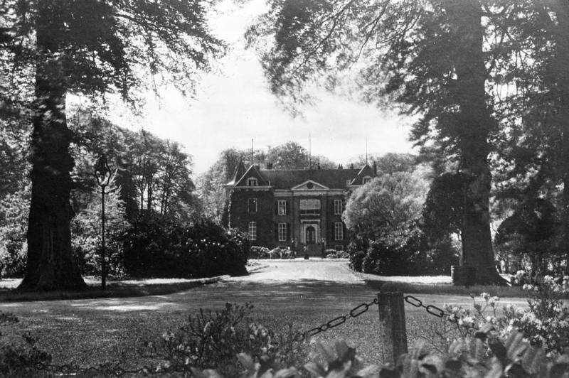 Exil Wilhelm II in Doorn